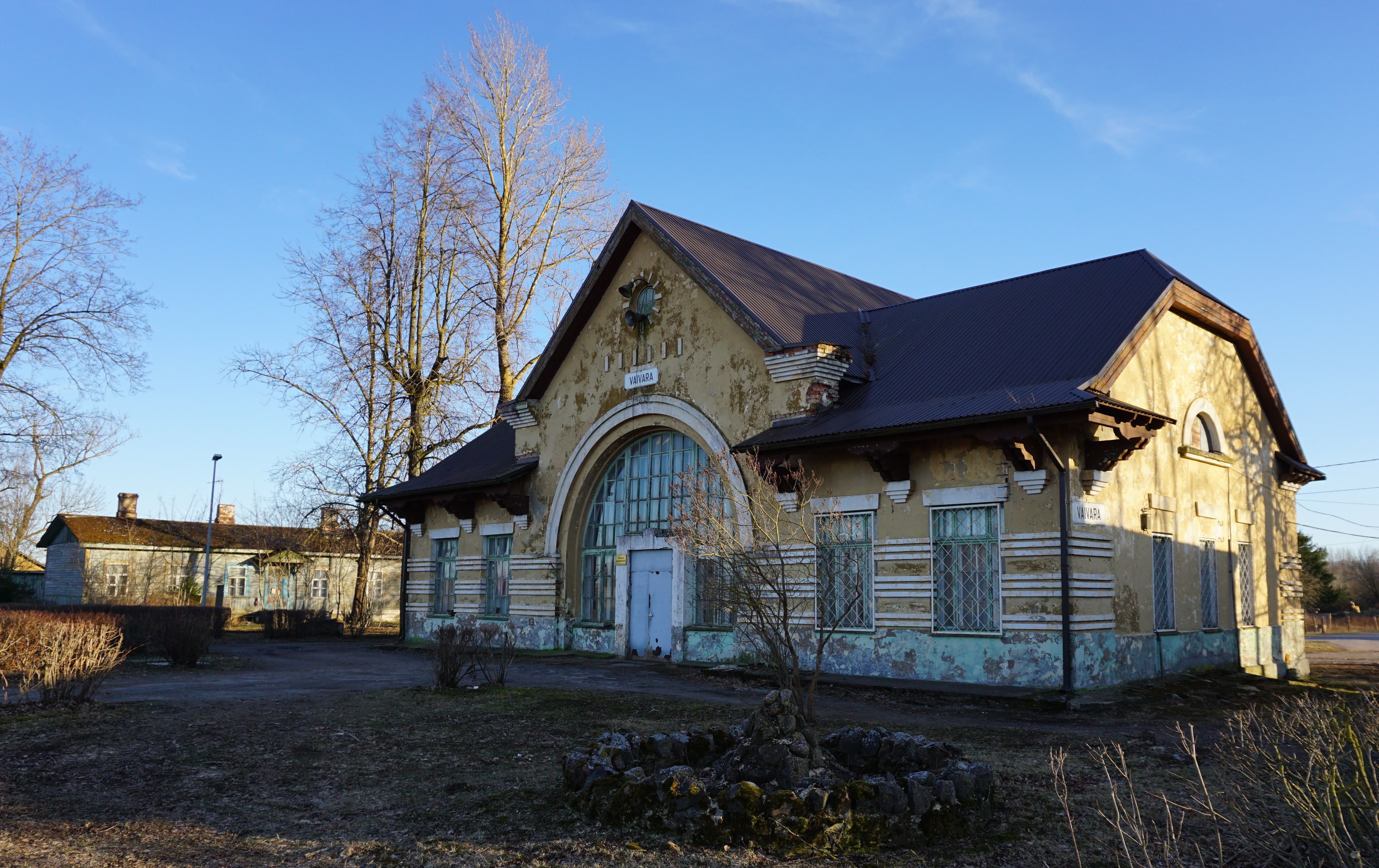 Vaivara vaksalihoone